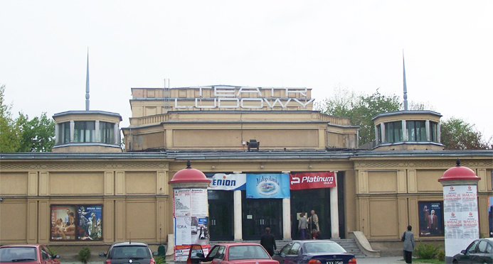 Teatr Ludowy - os. Teatralne, Krakow